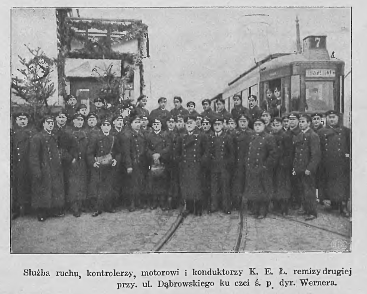 Załoga Kolei Elektrycznej Łódzkiej ku czci Wernera